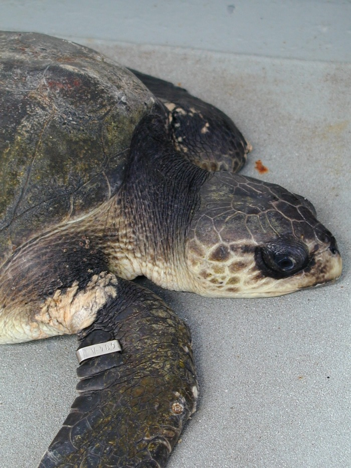 Meeresschildkröten